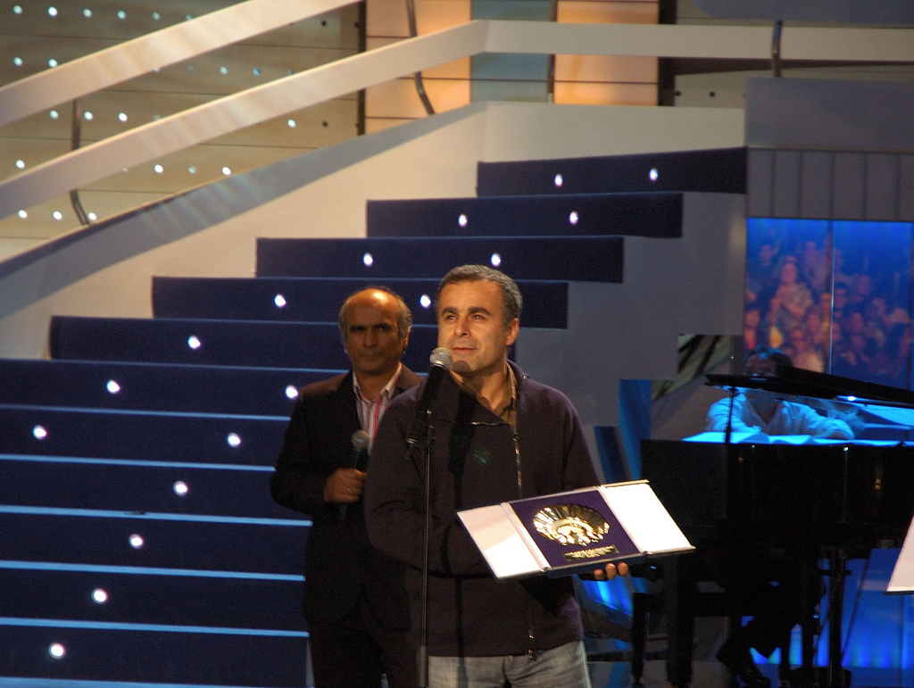 Bahman Ghobadi recibiendo la Concha de Oro en el Festival de San Sebastián (2006)